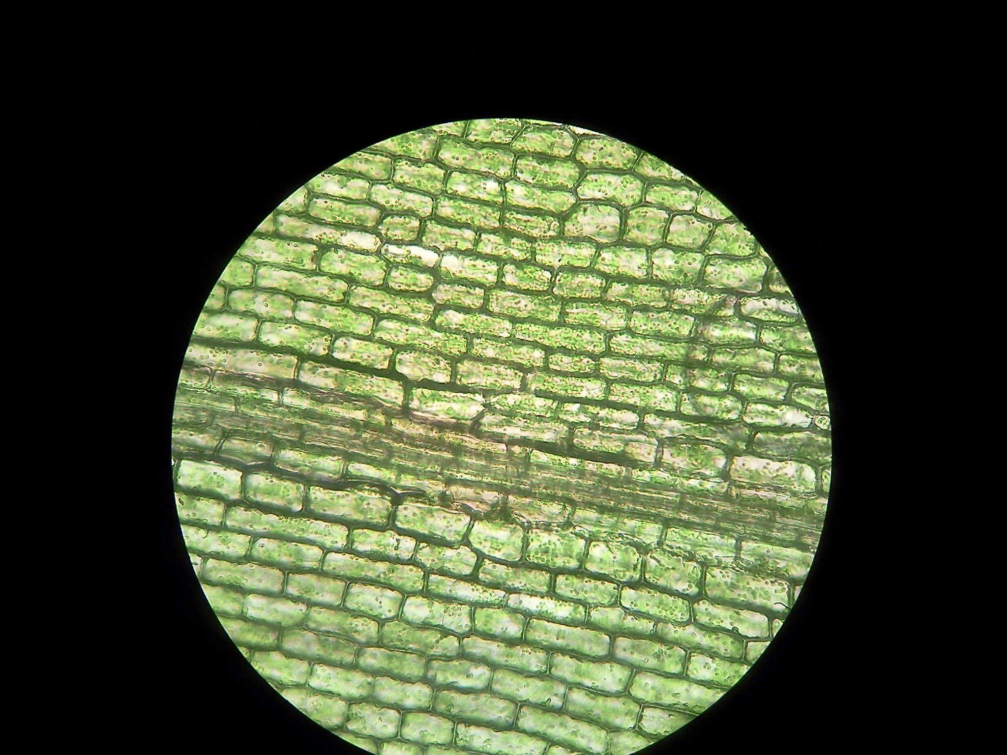 De celstructuur van de Waterpestplant onder een microscoop met vergroting van 640x.